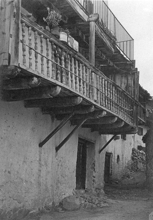 Vista d'un carrer del poble de Martinet. Marcel·lí Gausachs i Gausachs (ca. 1927)